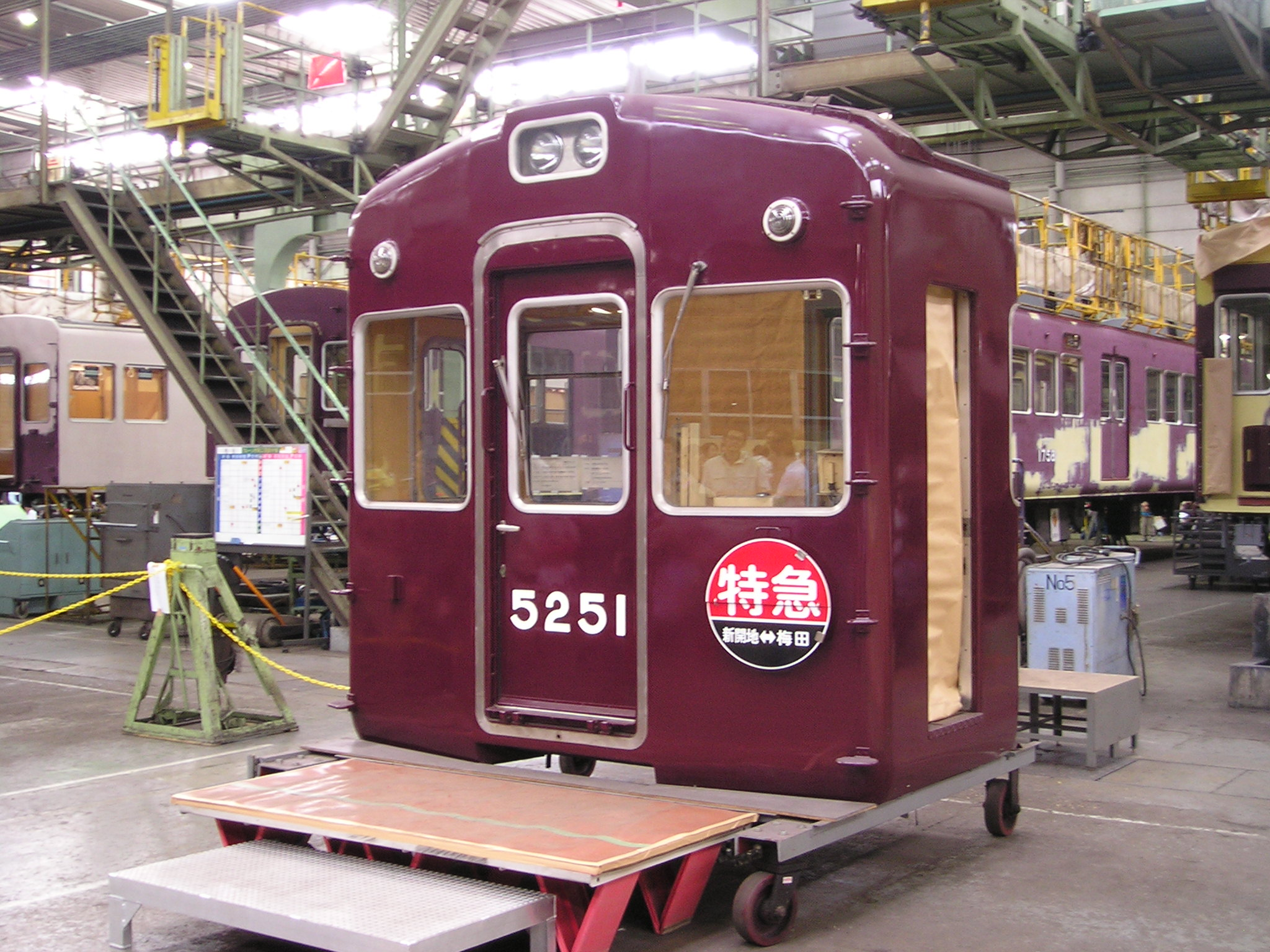 5251の前頭部。なぜか運転室扉はありません。（2009.10.25正雀工場にて撮影）